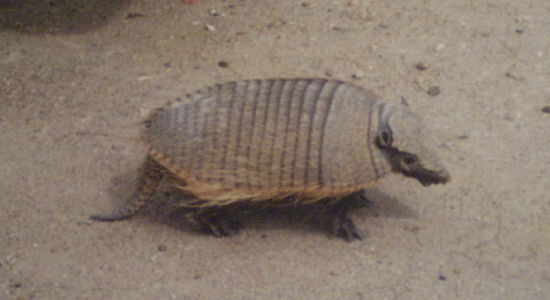 Ejemplar de peludo, en península Valdés. Punta Norte. Argentina.